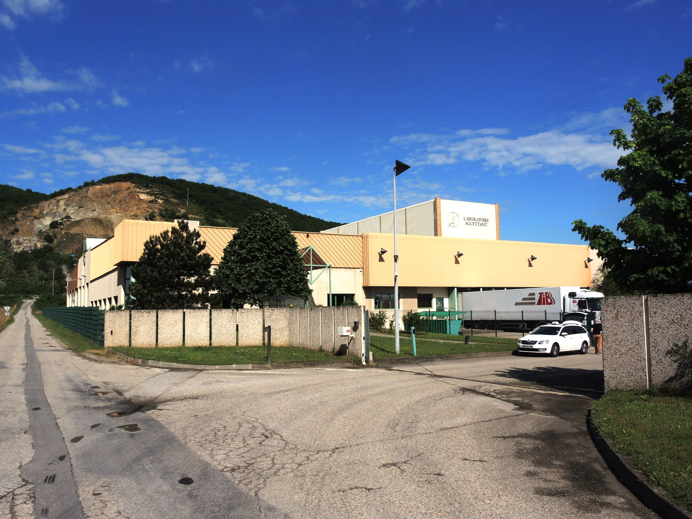 Champagne (Ardèche) détail